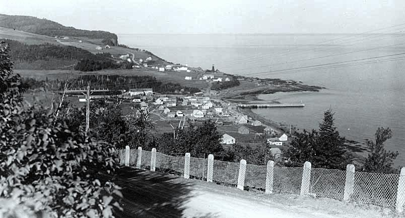 Photographie représentant La Martre, réalisée à partir d'une route surplombant le village. On y aperçoit le quai, l'usine de transformation du bois, le phare et l'église. Musée de la Gaspésie. Fonds Cornélius Brotherton. P141/1/5/48/8.